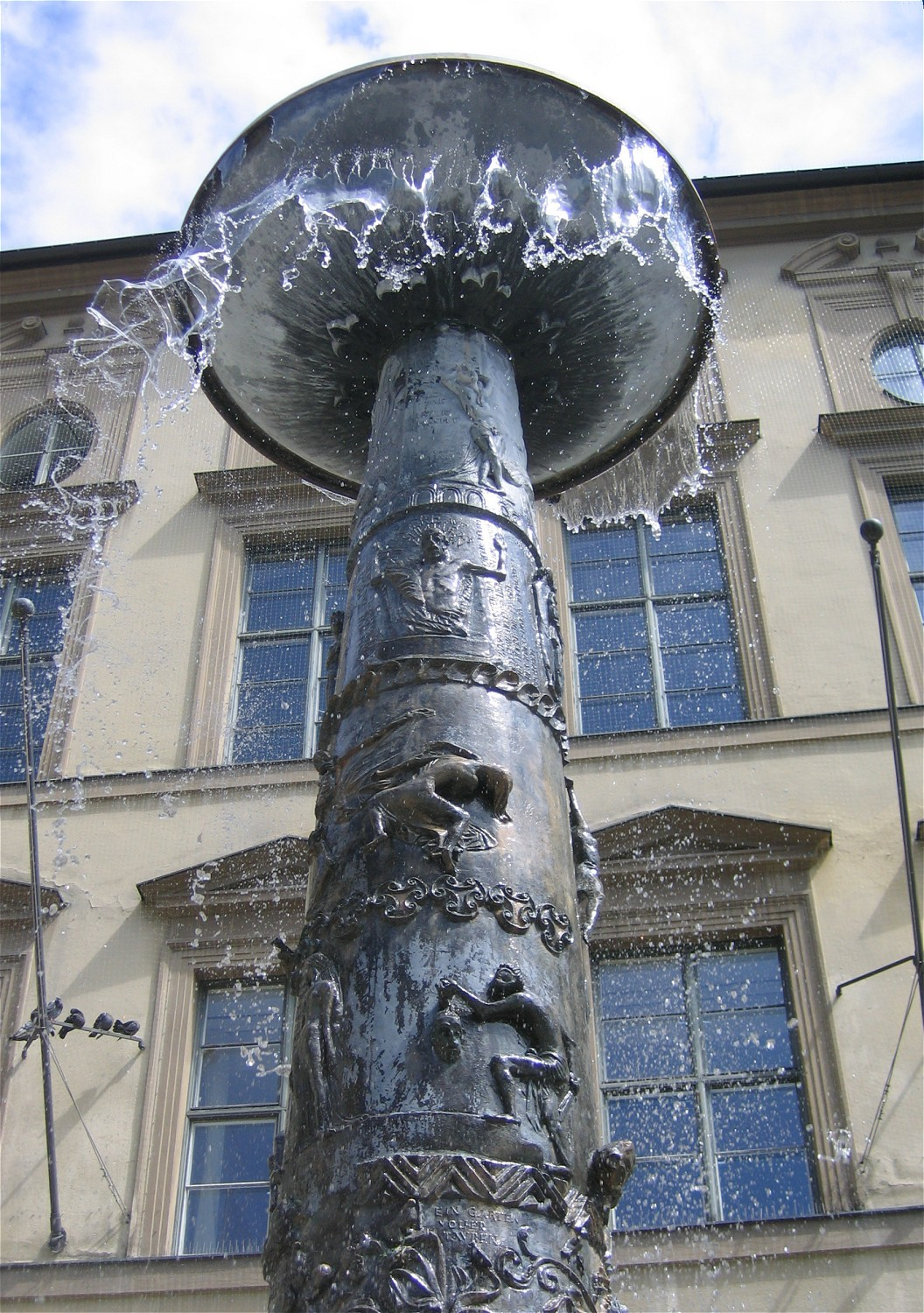 Richard-Strauss-Brunnen in München